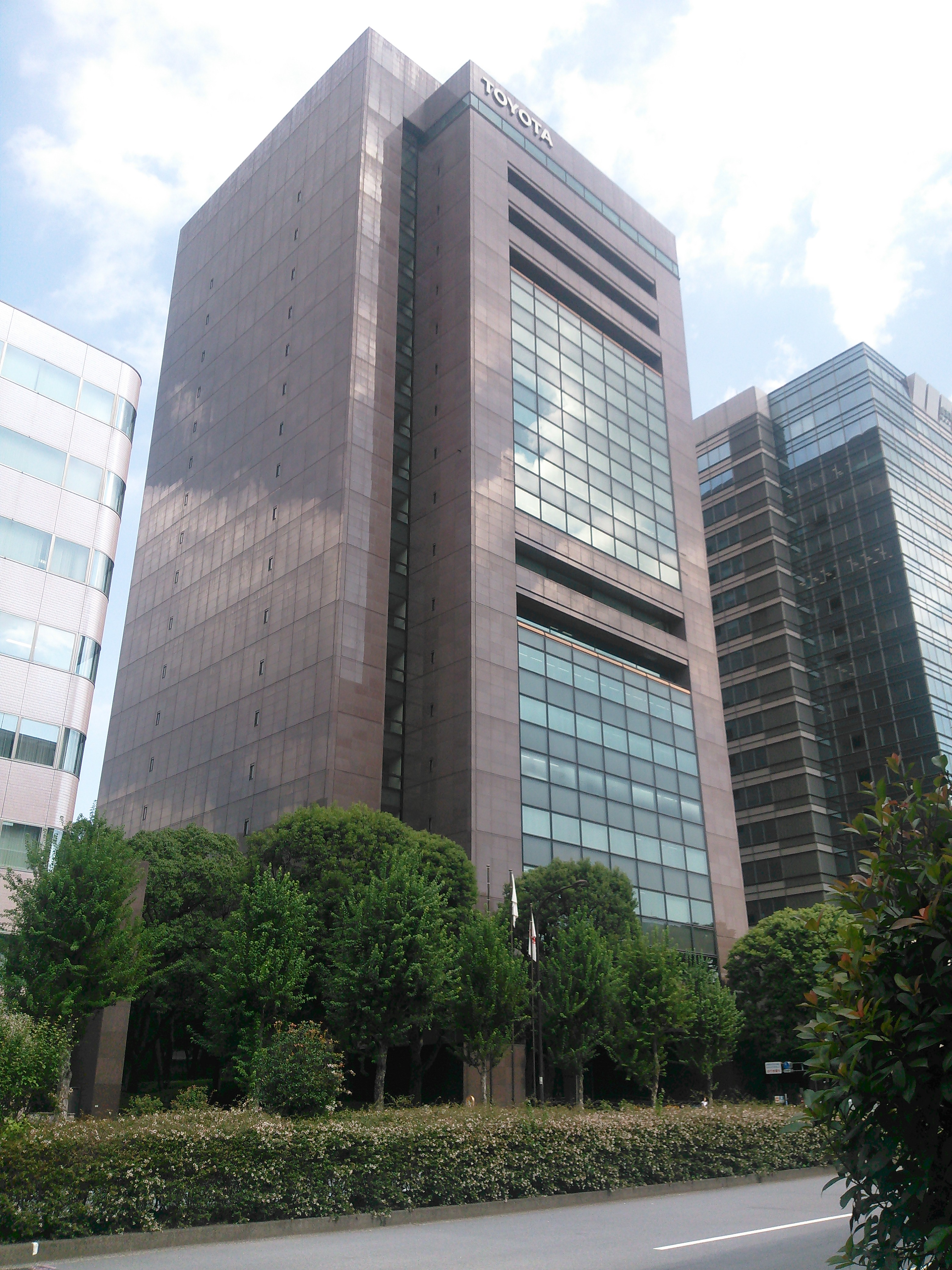 東京都文京区後楽、トヨタ自動車東京本社ビル